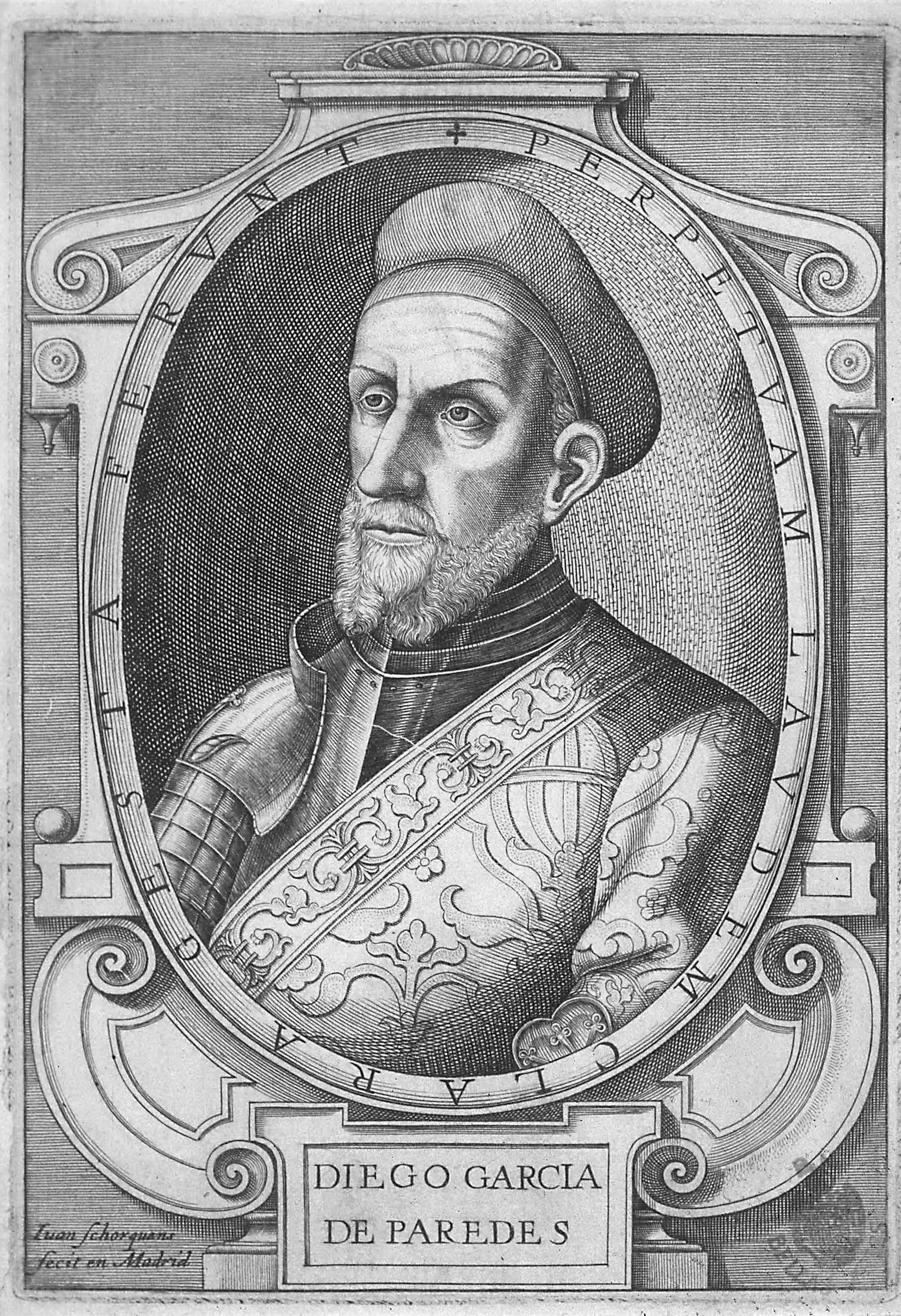 Retrato de Diego García de Paredes, ilustración de la obra de Tomás Tamayo de Vargas, Relación breve de su tiempo, impreso en Madrid por Luis Sánchez. Biblioteca Nacional de España.